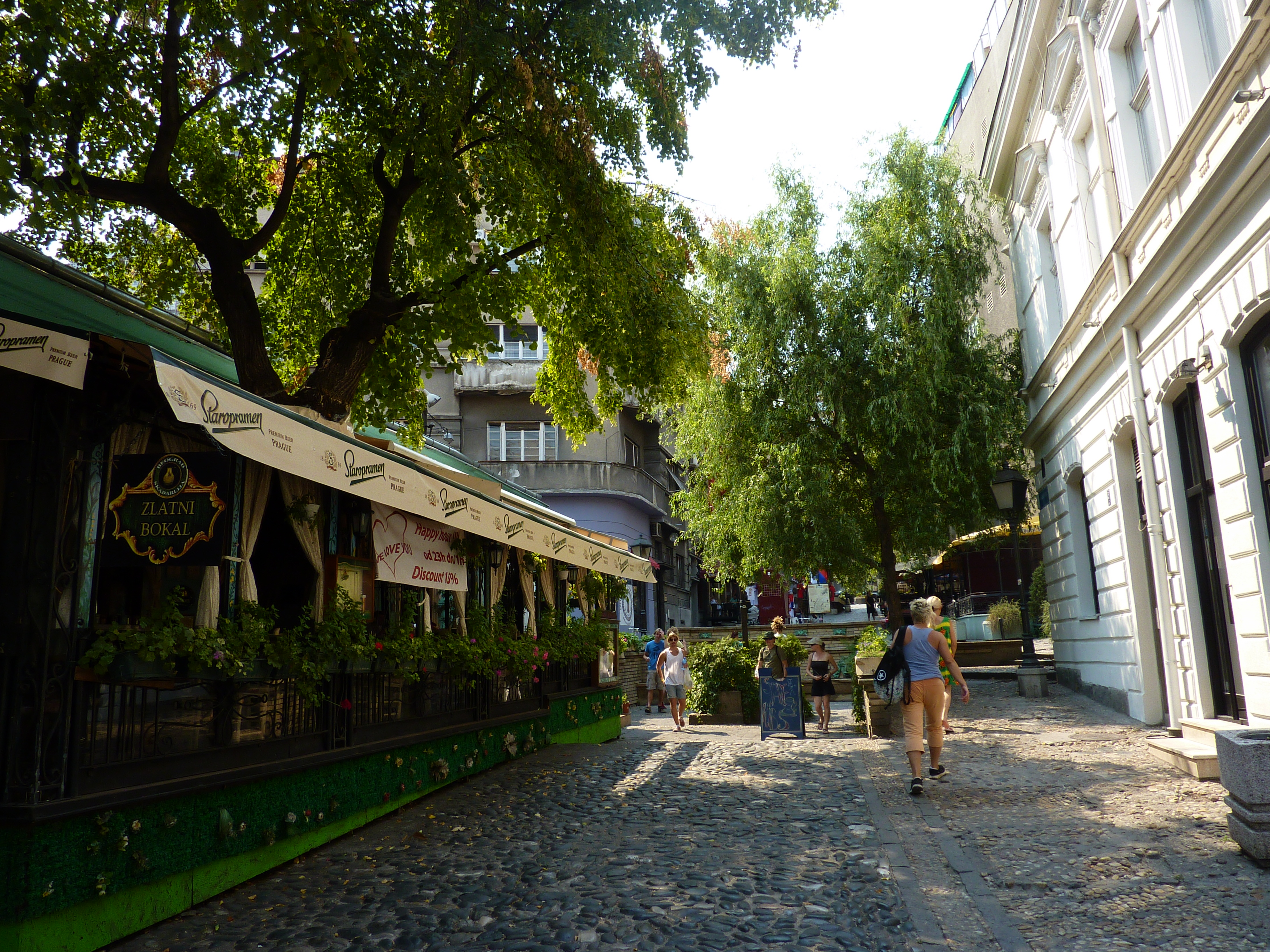 Skadarlija, Belgrade